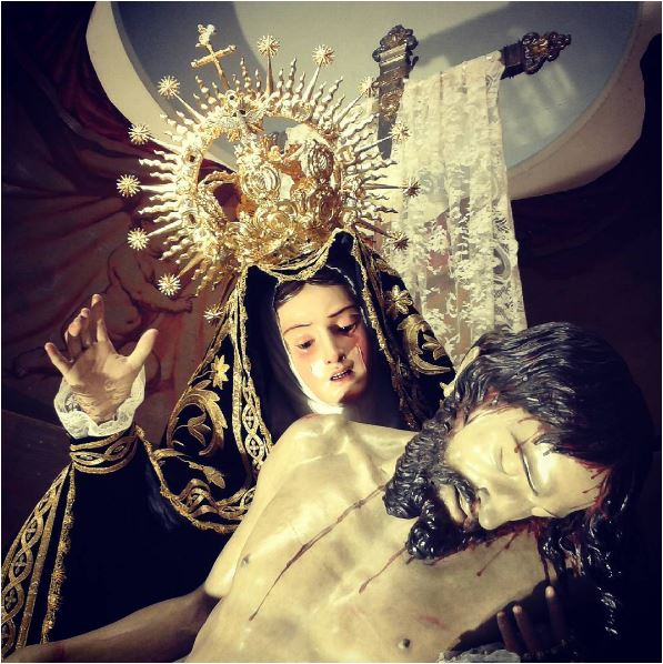 Nuestra Madre de las Angustias, es una de las imágenes de más devoción popular en la ciudad de Zamora desde inicios de la Edad Moderna. La imagen es obra de Ramón Álvarez, quien la finalizó en 1879. La Virgen es de bastidor, teniendo talladas solamente cabeza, pies y manos; el Cristo yacente es totalmente de talla, destacando por la capacidad que tuvo el artista para hacerlo más ligero, llegando en algunos puntos su grosor a poco más de 5 milímetros, y se completa con una cruz de plata sobre armazón de madera.